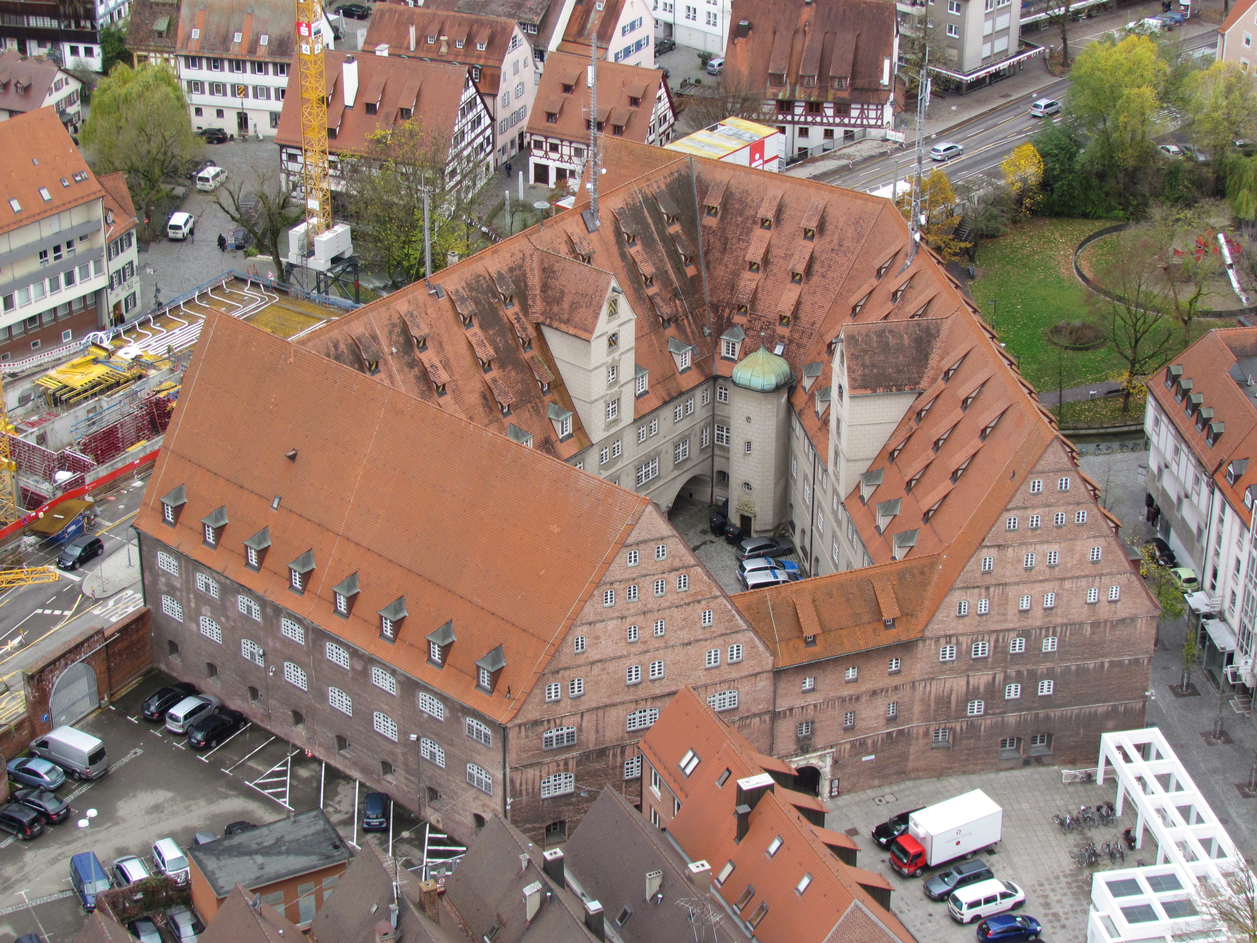 Bildinhalt: Der Neue Bau in Ulm vom Turm des Münsters aus gesehen Aufnahmeort: Ulm, Deutschland